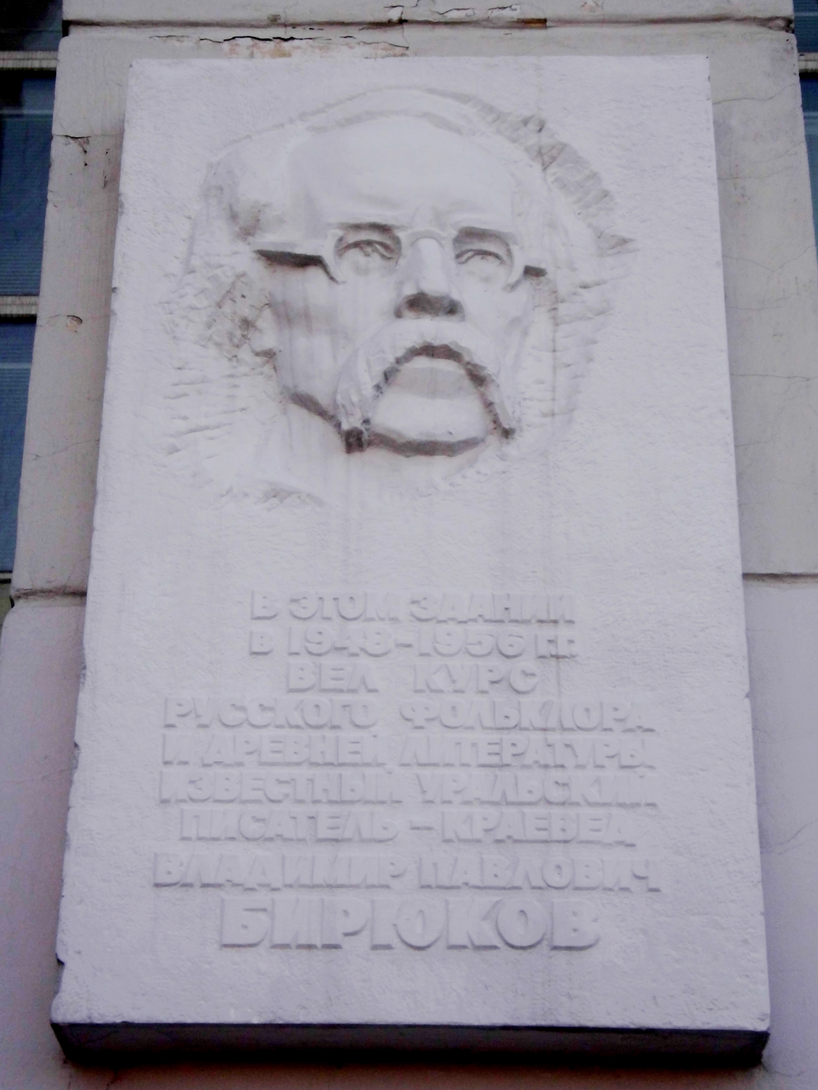 Здание, где в 1941 г. выступал писатель Серафимович А. и работал писатель-краевед Бирюков В. П.: проспект Ленина, 69 (передняя центральная и правая части комплекса зданий основного учебного корпуса педагогического университета), Челябинск, Челябинская область. Передняя (северная) сторона здания. Памятная табличка (барельеф) на колонне здания.